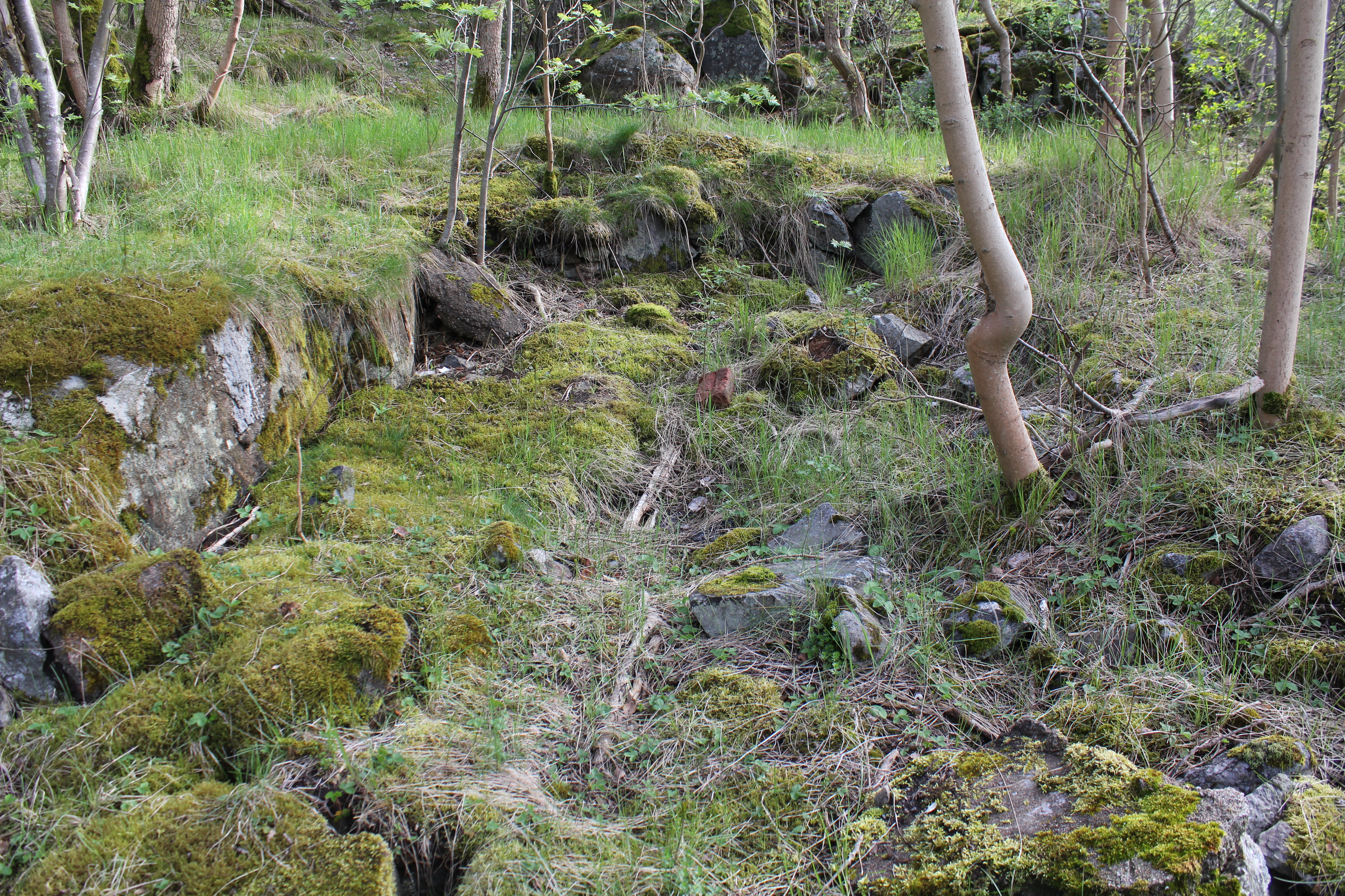 Östberga bytomt vid Årstafältets södra hörn. Områdets enda kvarvarande husgrund.